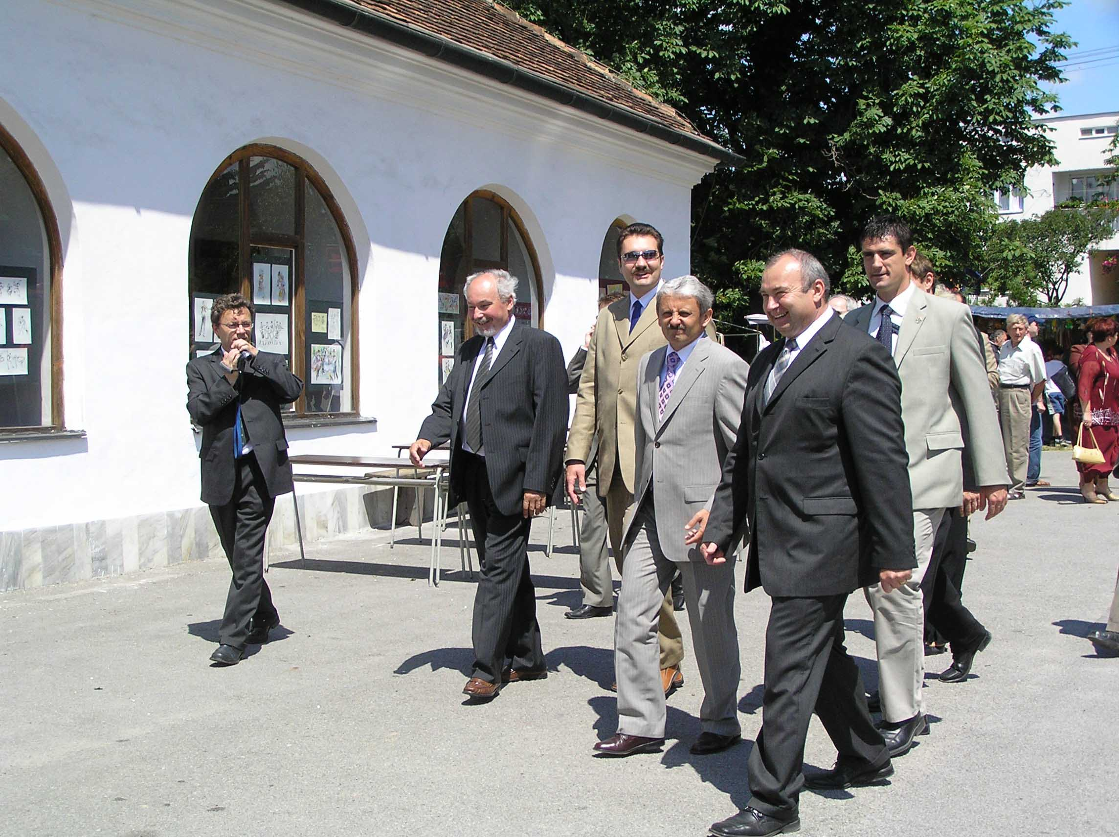 Popis: Mikuláš Dzurinda v Rozhanovciach. Autor: Vladimir Supik - Gioel Dátum: 11. 7. 2006 Licencia: PD Kategória:Presunúť_na_Commons